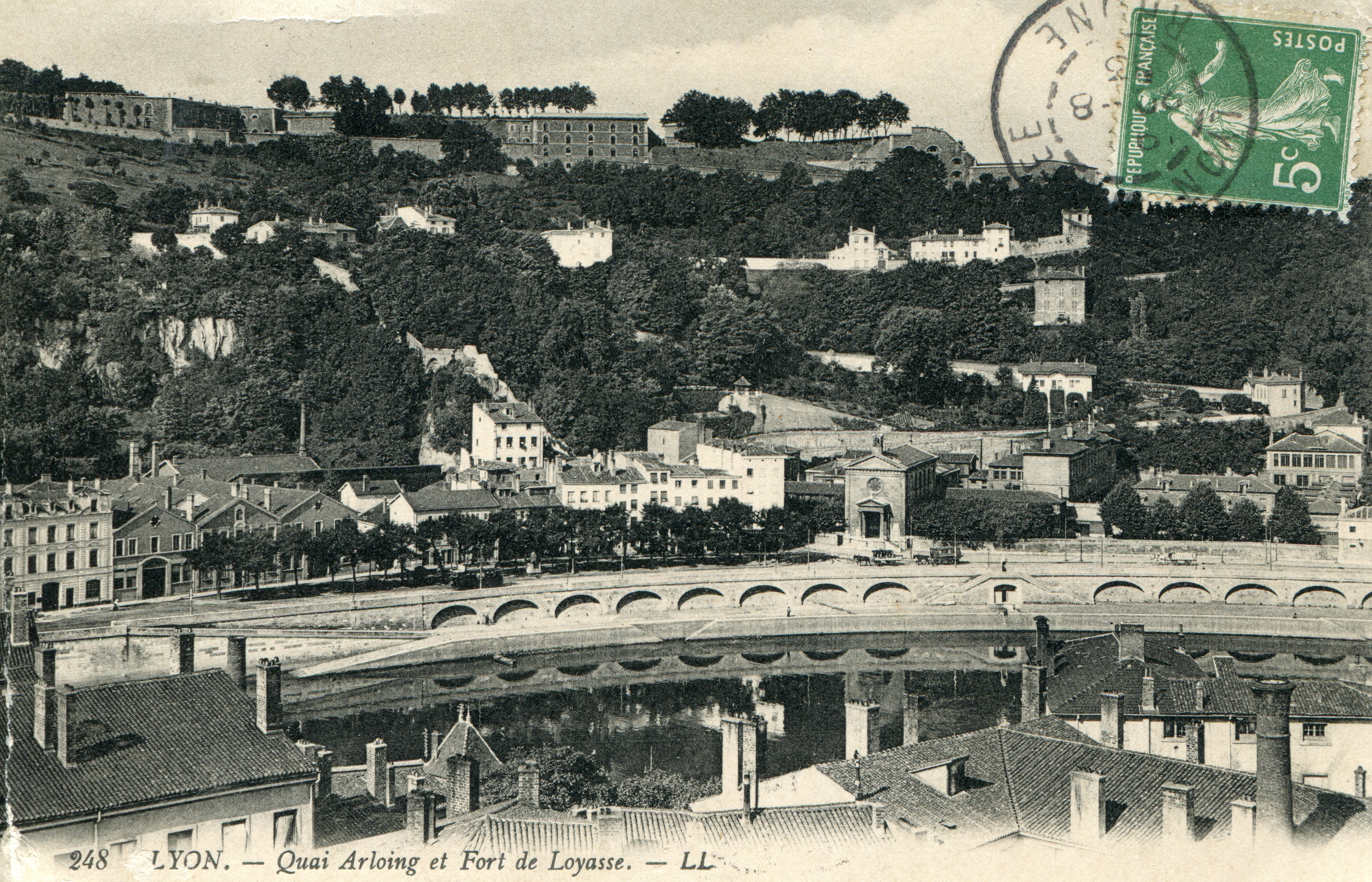 Carte postale postée le 20.08.1906, présentant le « quai "Arloing" et fort de Loyasse » en haut de la colline, en rive droite (côté sud) de la Saône à Lyon. La chapelle en bord de Saône est la chapelle de l'Observance ; avec le début de la montée de l'Observance qui part par la gauche devant la chapelle, le quai Pierre Scize à gauche et le quai Chauveau à droite (le quai Arloing se termine plus à droite vers l'amont, seulement 20 m aval du pont Koenig que l'on ne voit pas : il y a erreur sur les noms de quais dans la légende de la carte postale). Au milieu de la partie gauche de la photo, l'éperon rocheux près de la rivière, presque à l'aplomb du fort de Loyasse, est la Pierre-Scise qui portait le château de Pierre-Scise.